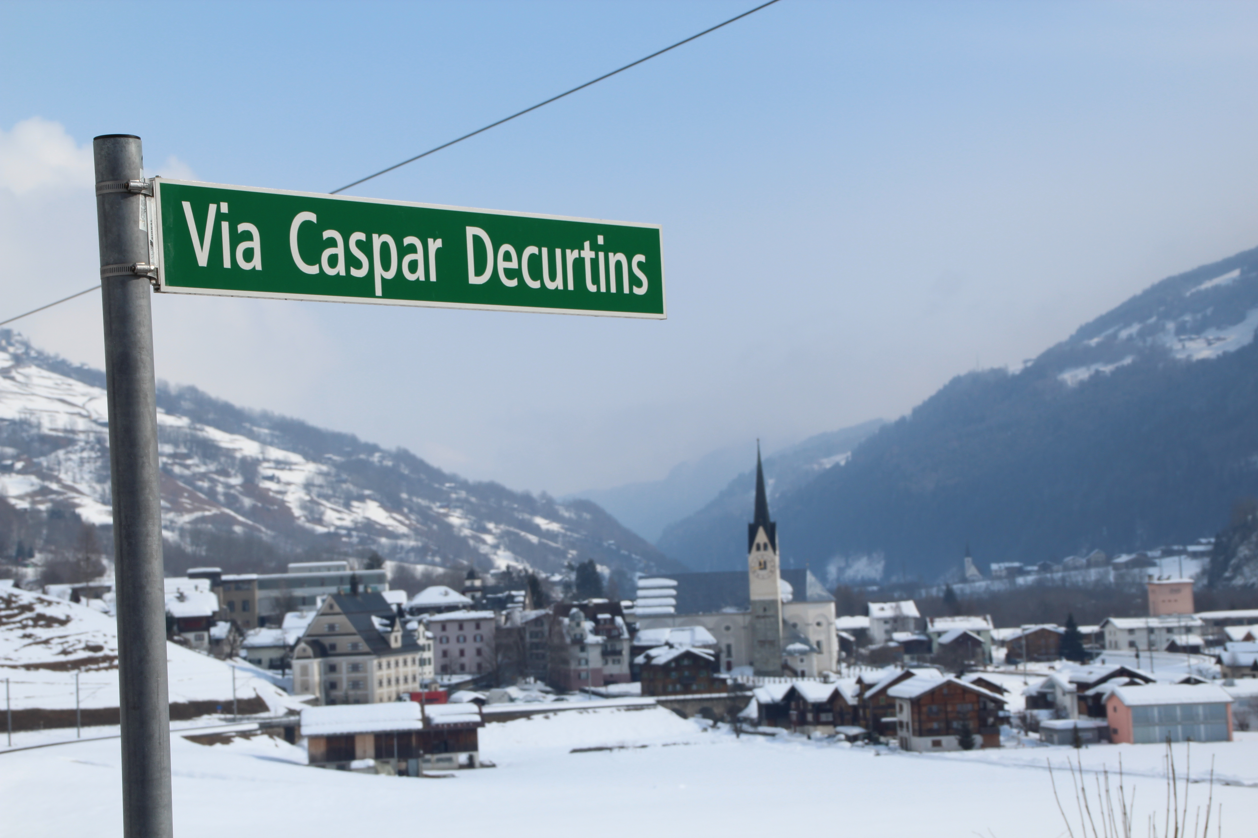 Trun